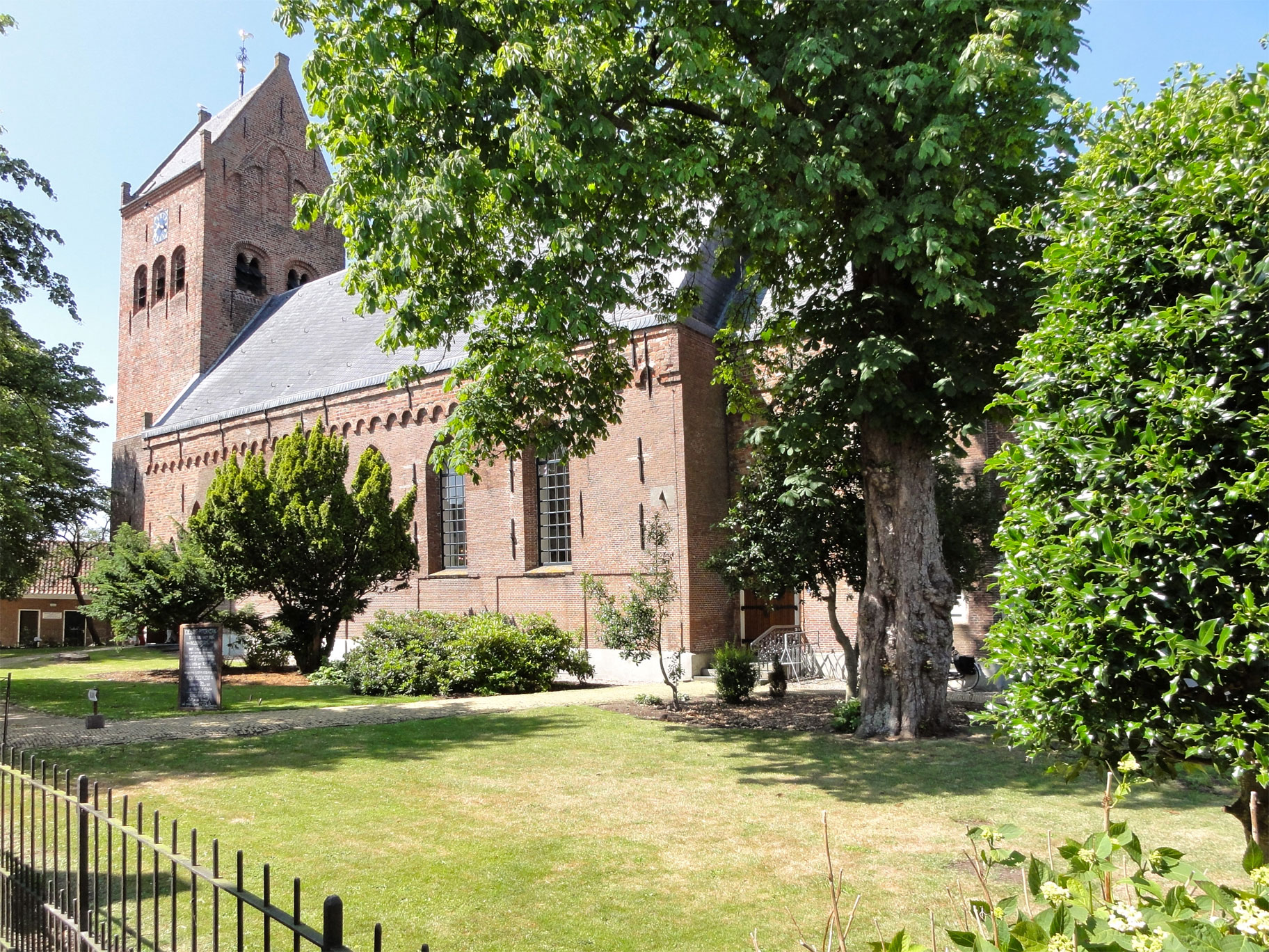 Sint Pieterkerk van Grou